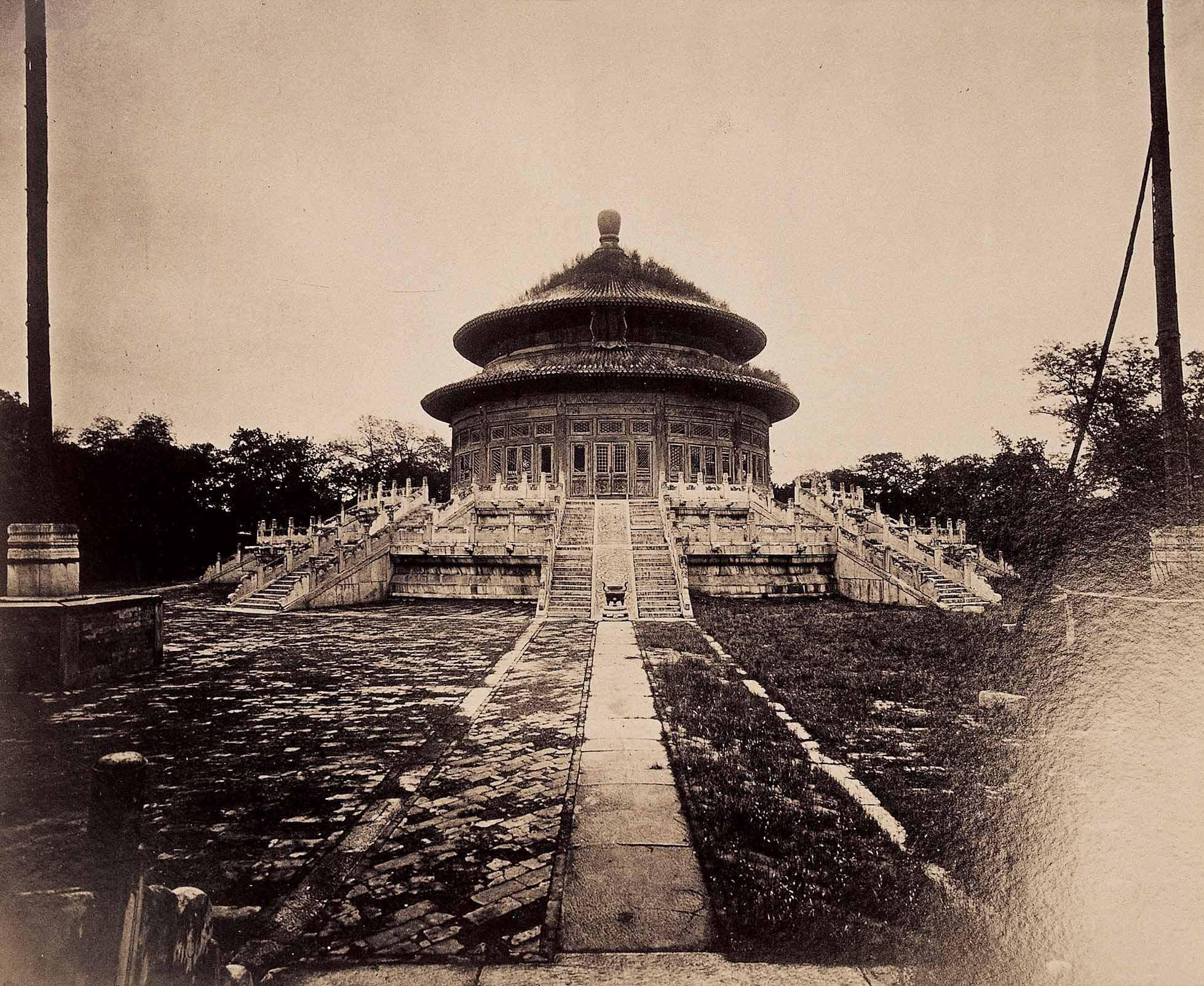 北京大光明殿